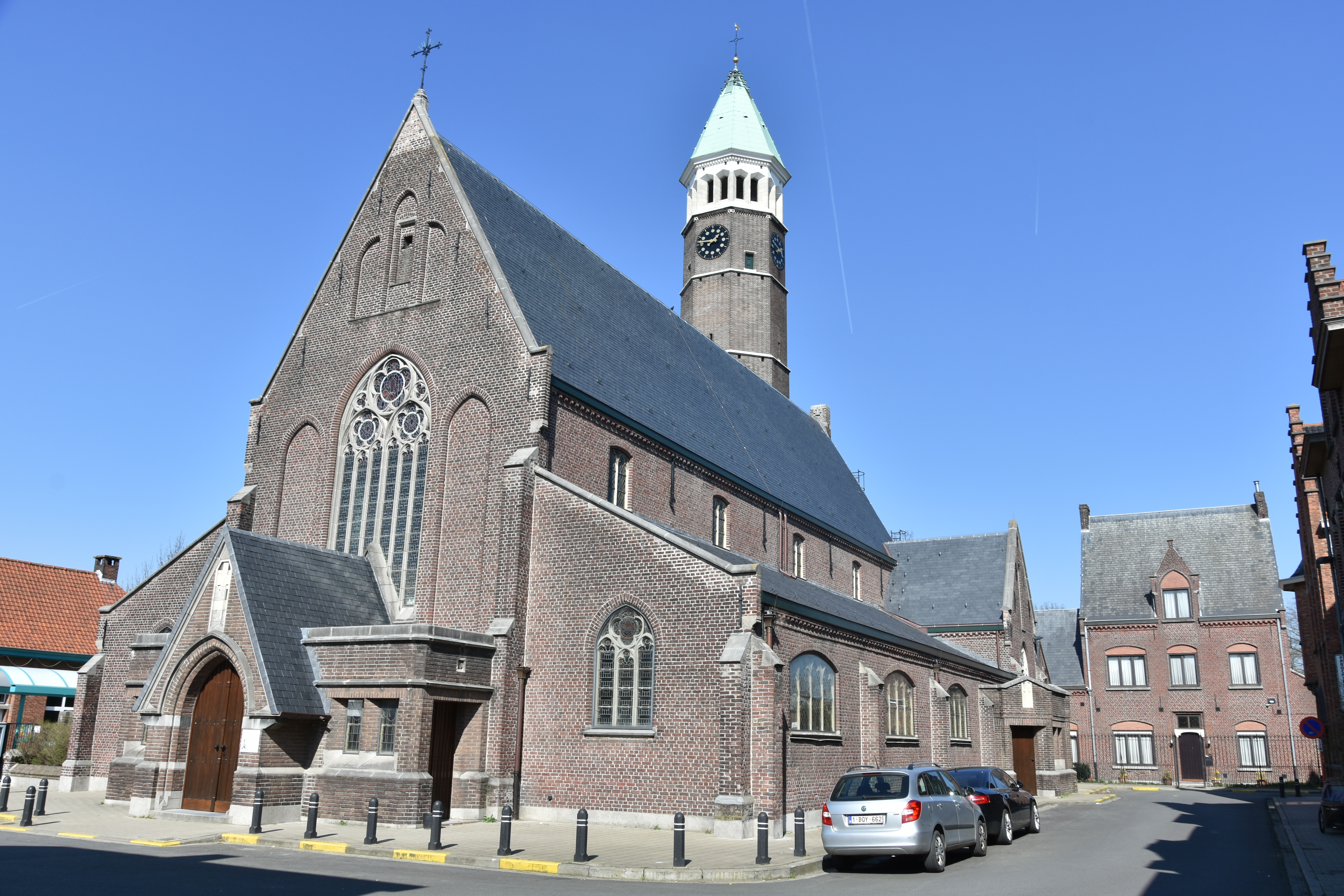 Sint-Eligiuskerk (Gentbrugge) 22-03-2019 13-46-49